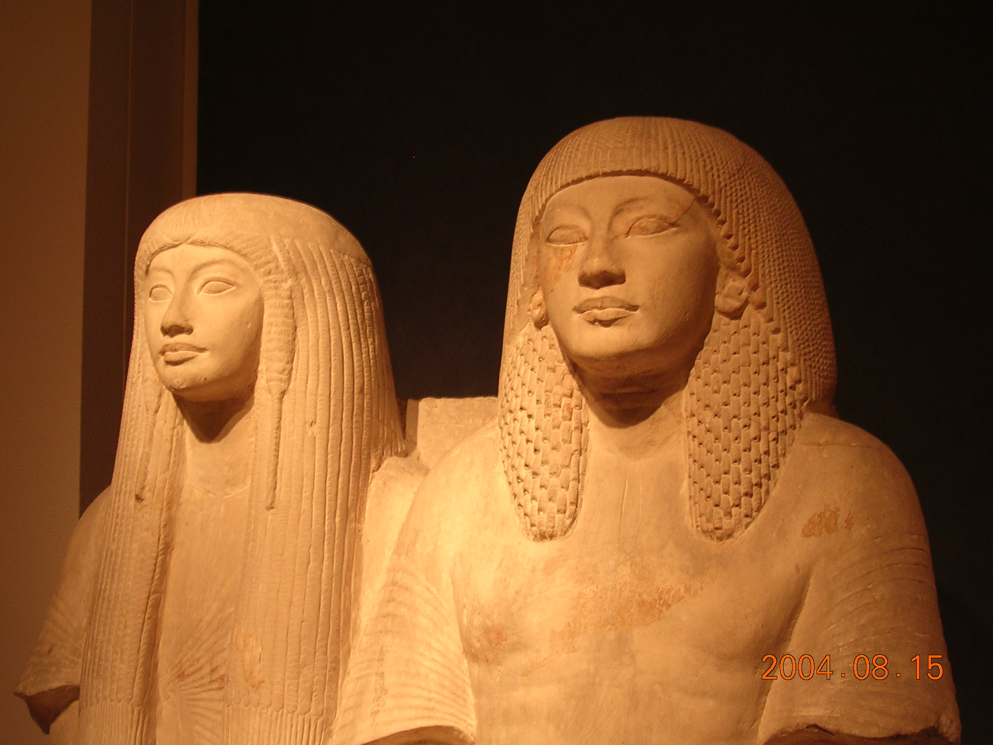 Maya és Merit szobra (Hollandia, Leiden, Rijksmuseum van Oudheden)